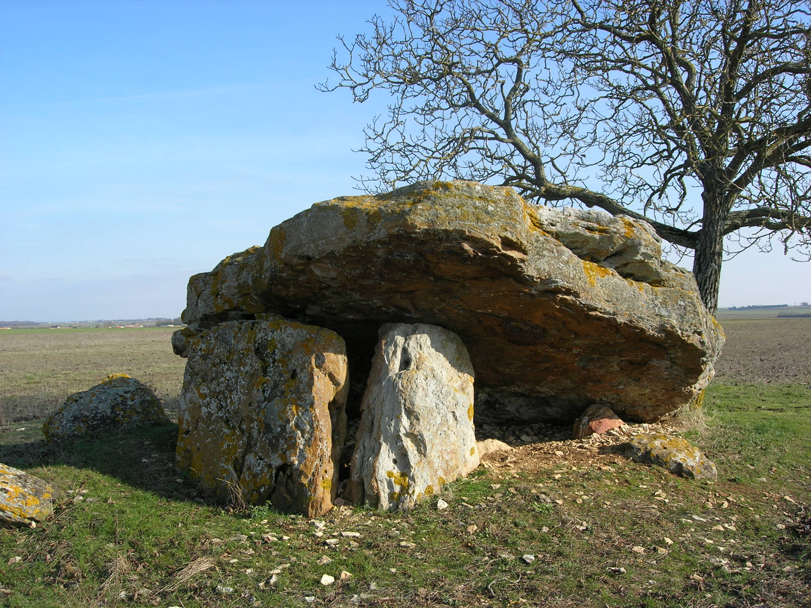 Description =Dolmen dans le Poitou Source =Photo taken by Remi Jouan Date =Février 2006 Author =Remi Jouan